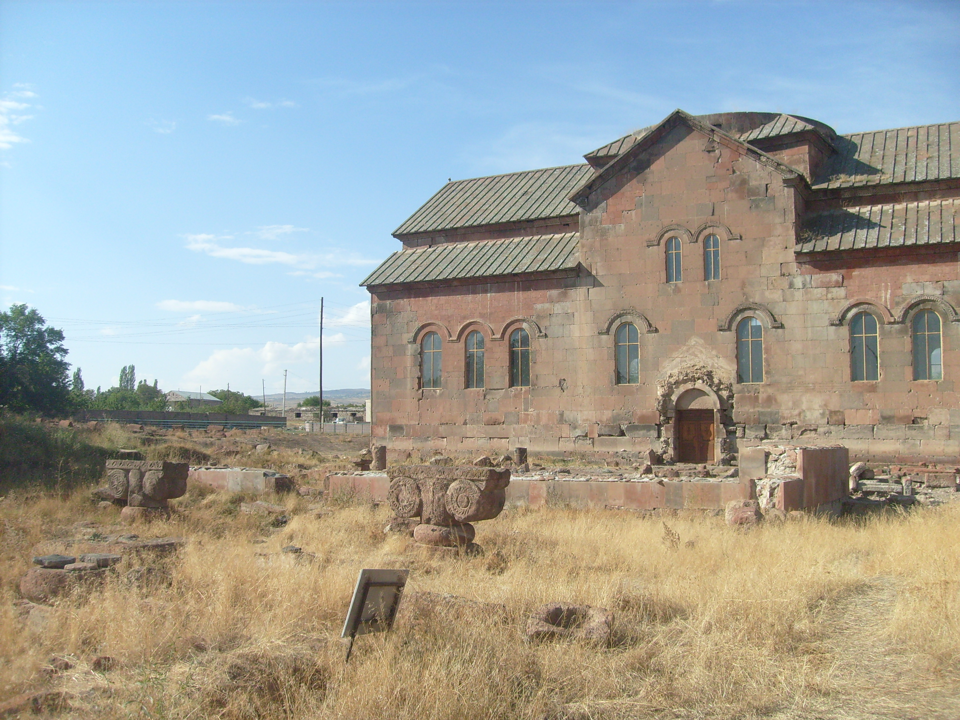 Արուճի եկեղեցական համալիր Ս. Գրիգոր (Արուճի կաթողիկե) 22/8